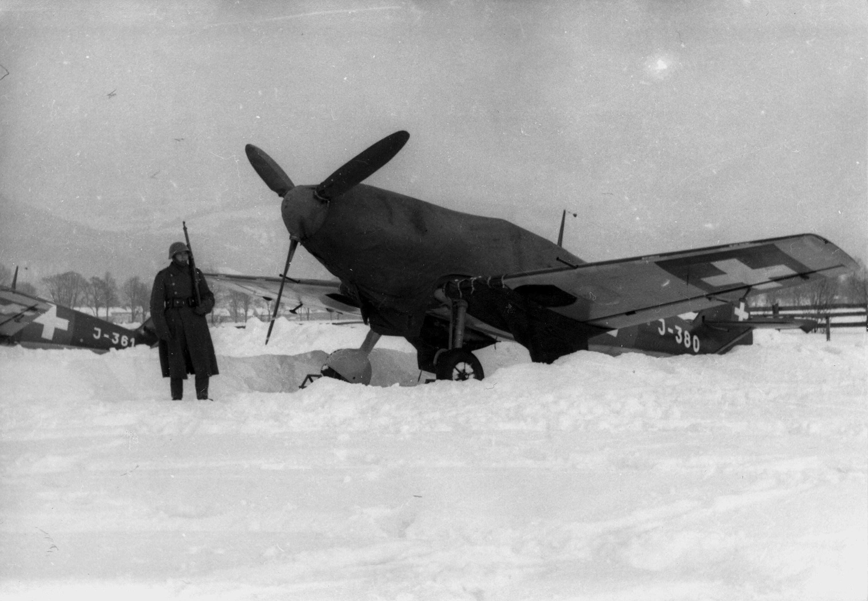 Schweizer Me 109 mit Immatrikulation J-380 auf einem verschneiten Flugplatz, zirka 1942